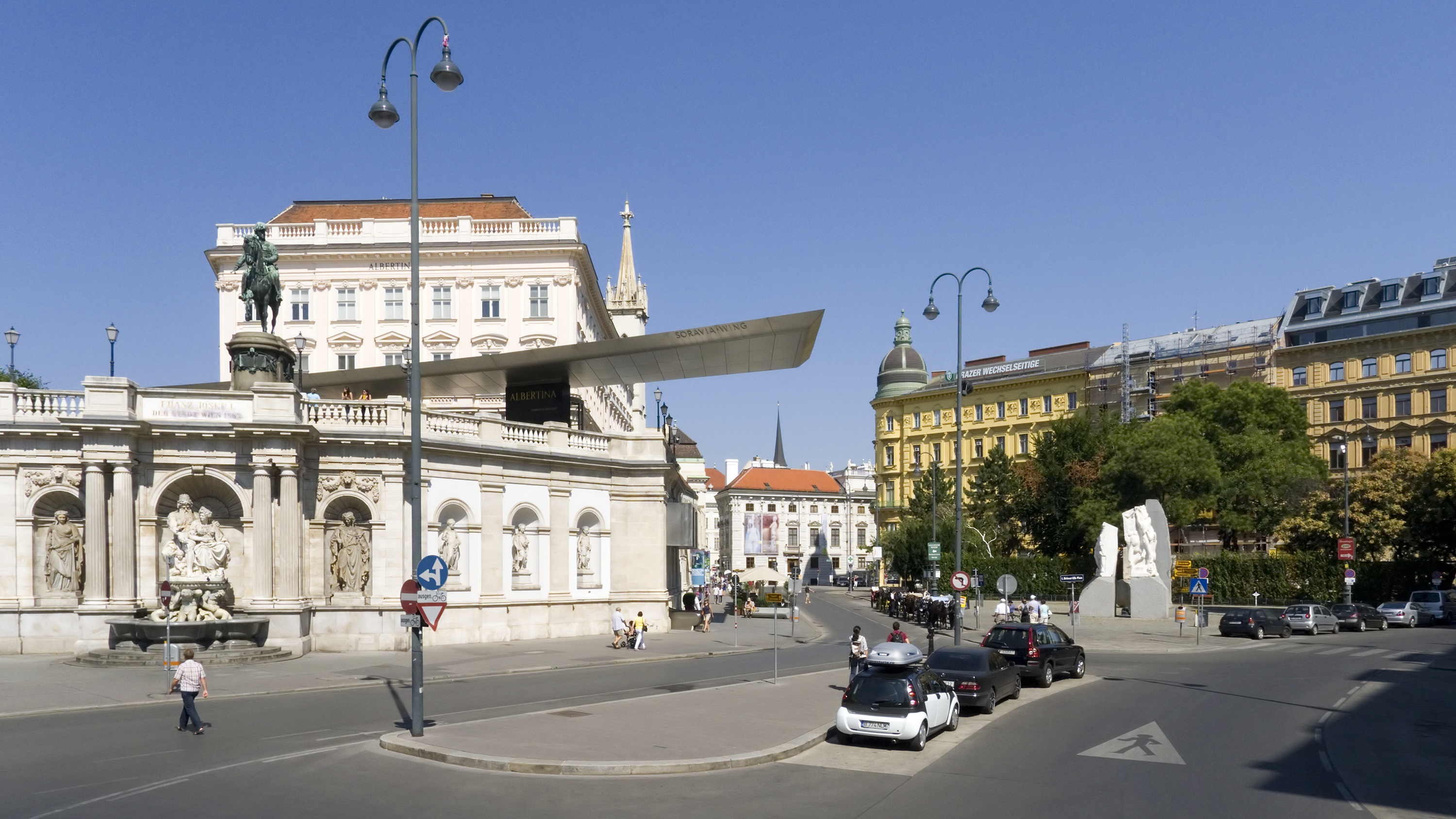 Albertinaplatz in Wien 1 bei der Philharmonikerstraße Richtung Norden